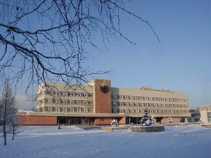 Здание органов муниципального управления (Кирово-Чепецк)